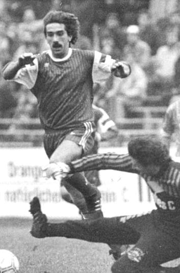 Title: FC Sachsen Leipzig - HFC Chemie 1:3 Factual corrections and alternative descriptions are encouraged separately from the original description. Additionally errors can be reported at this page to inform the Bundesarchiv. Original historic description: ADN- Wolfgang Kluge-28.11.90- Leipzig: Fußball-Oberliga Nordost- FC Sachsen Leipzig - HFC Chemie 1:3 (0:2) Hier scheitert Lutz Schülbe (2.v.l.) noch am Leipziger Torwart Rene Müller, wenige Minuten später jedoch erzielte er das entscheidende dritte Tor für den HFC Chemie.